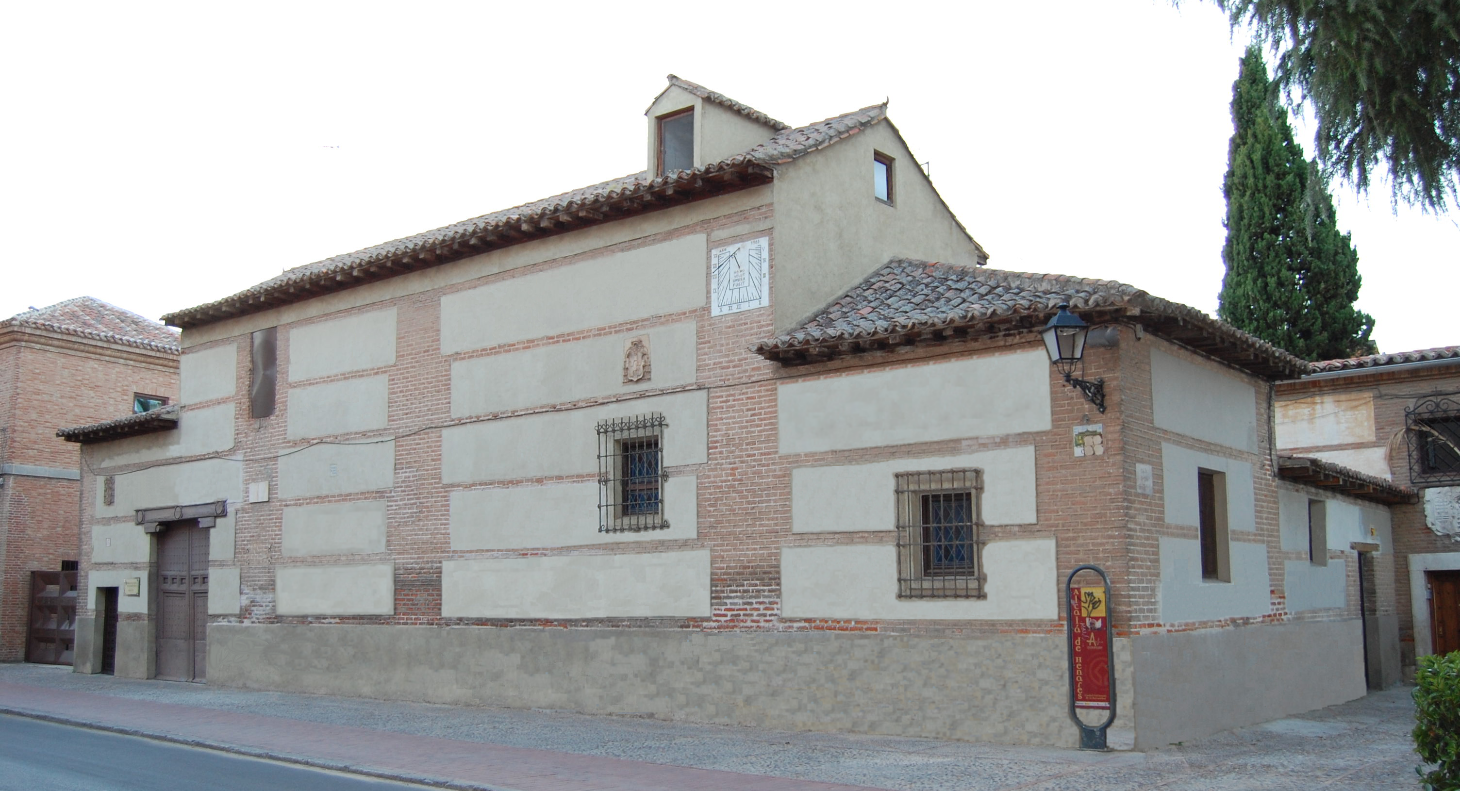 Ermita Universitaria del Cristo de los Doctrinos en Alcalá de Henares (Comunidad de Madrid - España).